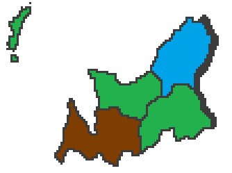 Alcaldes del Morrazo.